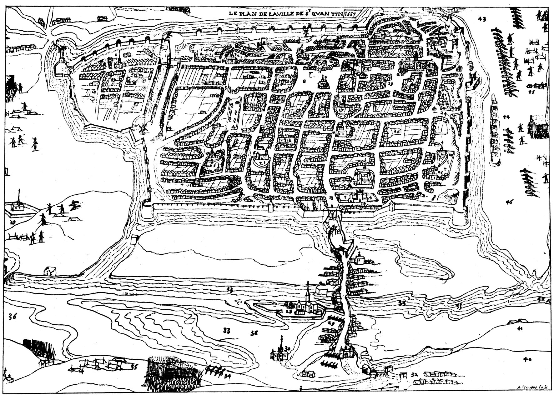 Vue de la ville de Saint-Quentin en 1557. D'après un dessin de la collection Lallemand de Betz. Lithographie publiée en 1896, par E. Lemaire et alii, La guerre de 1557 en Picardie. etc.